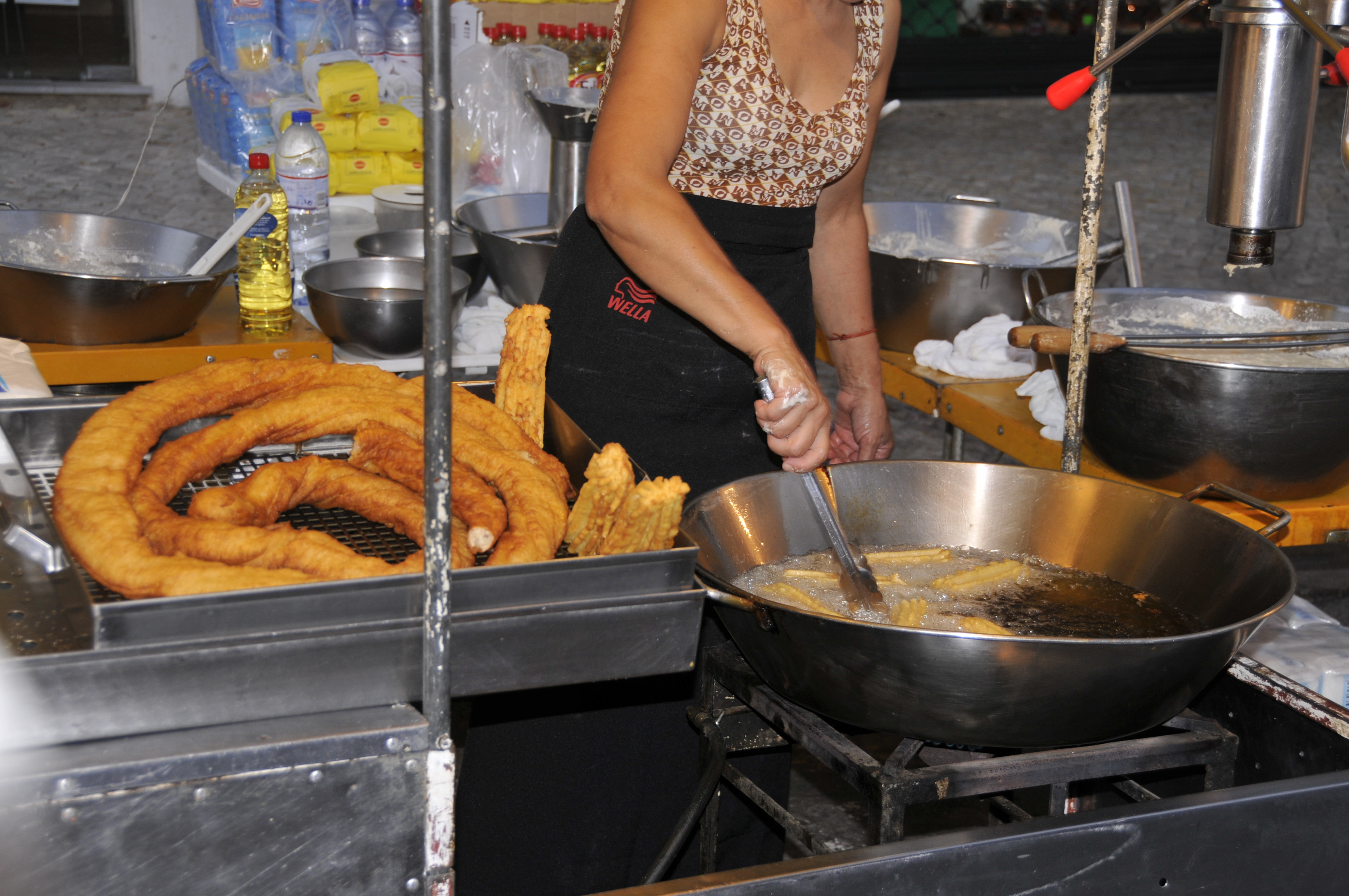 Churro-Stand, Moncarapacho, Portugal